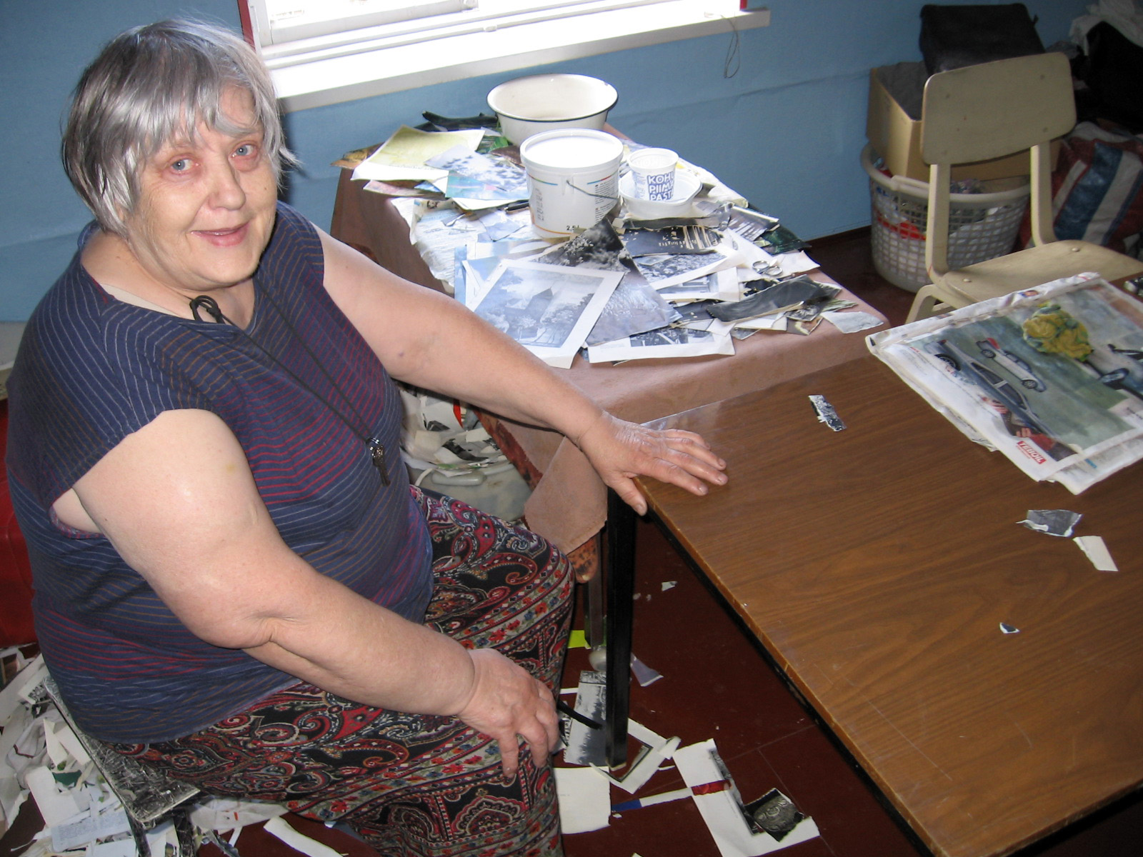 Eevi Nerva tegemas kollaaže Regio kontori uste jaoks.